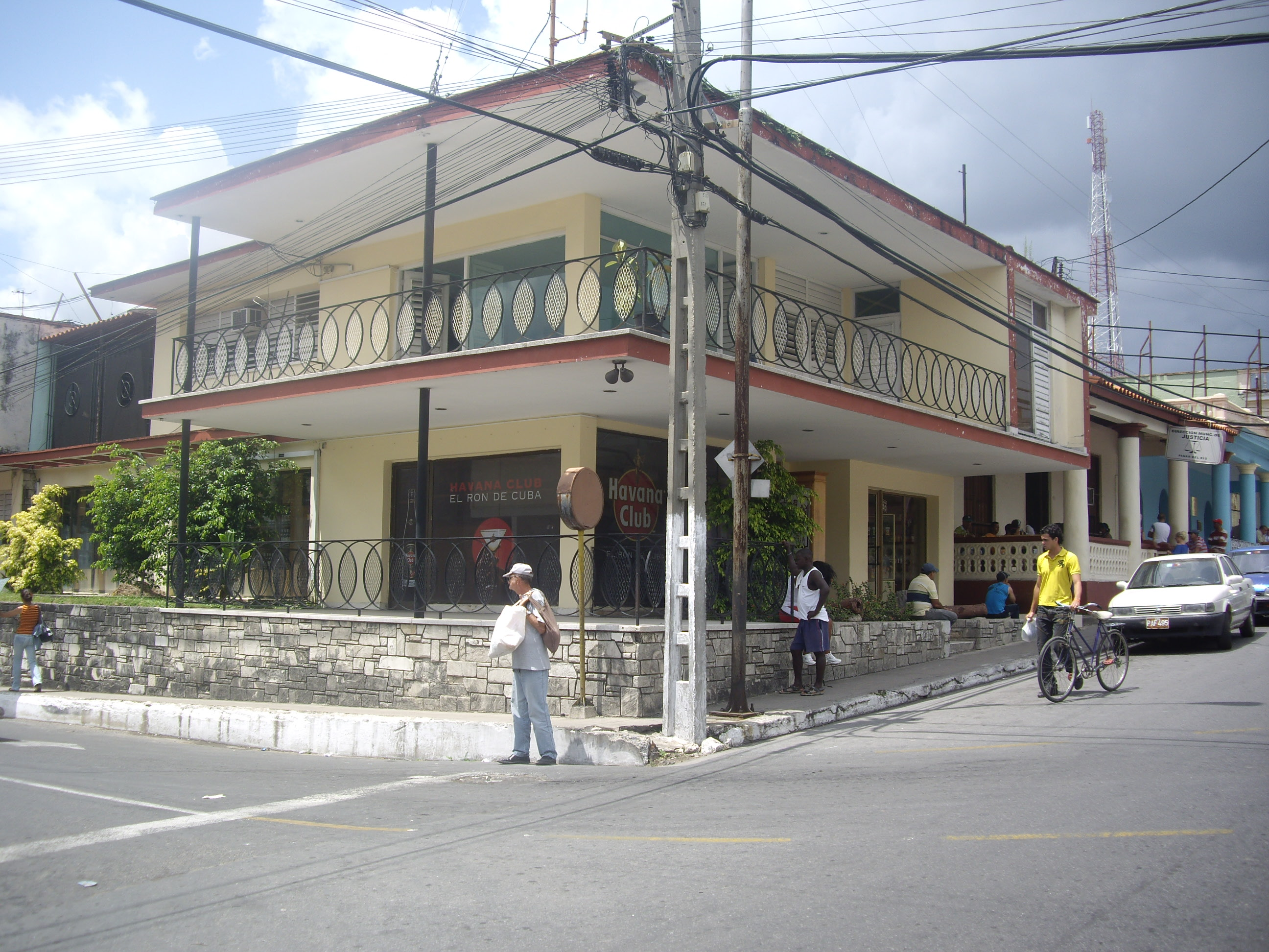 La Casa del Ron a Pinar del Rio